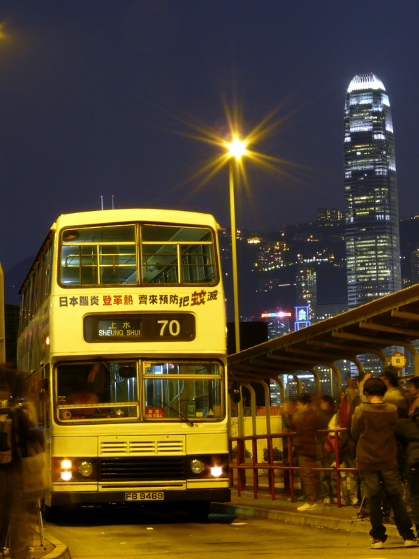 九巴70線營運最後一天，有大量巴士迷去拍照留念